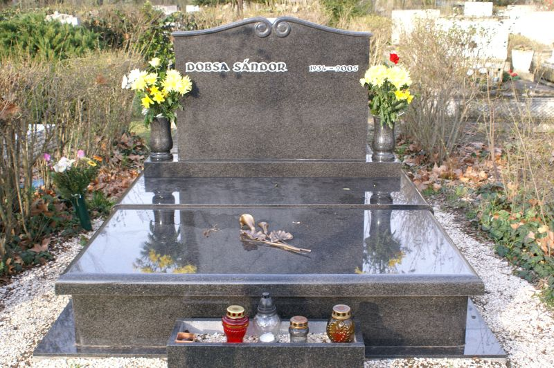 Dobsa Sándor (Szeged, 1934. január 10. - 2005) zongorista, a Magyar Rádió tánczenekarának komponistája, karmestere, a "Stúdió 11" zenekar megalapítójának sírja Budapesten. Megyeri temető: 22/0/1/98-99